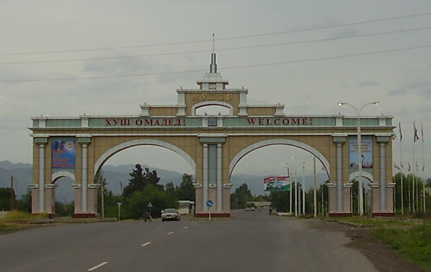 Kulob welcome